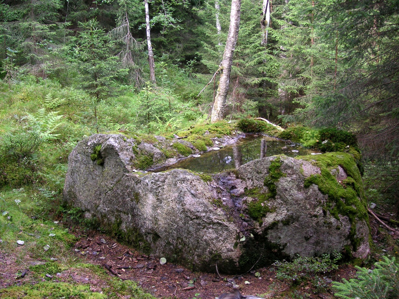 Vattstenen i Skattlösberg, Grangärde socken, Ludvika, Dalarna.